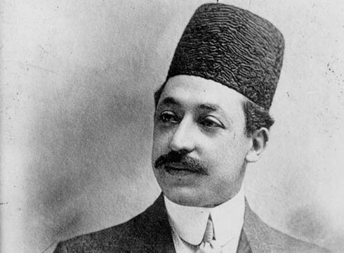 احمد قوام در جوانی زمانی که با نام میرزا احمد دبیرحضور شناخته می‌شد